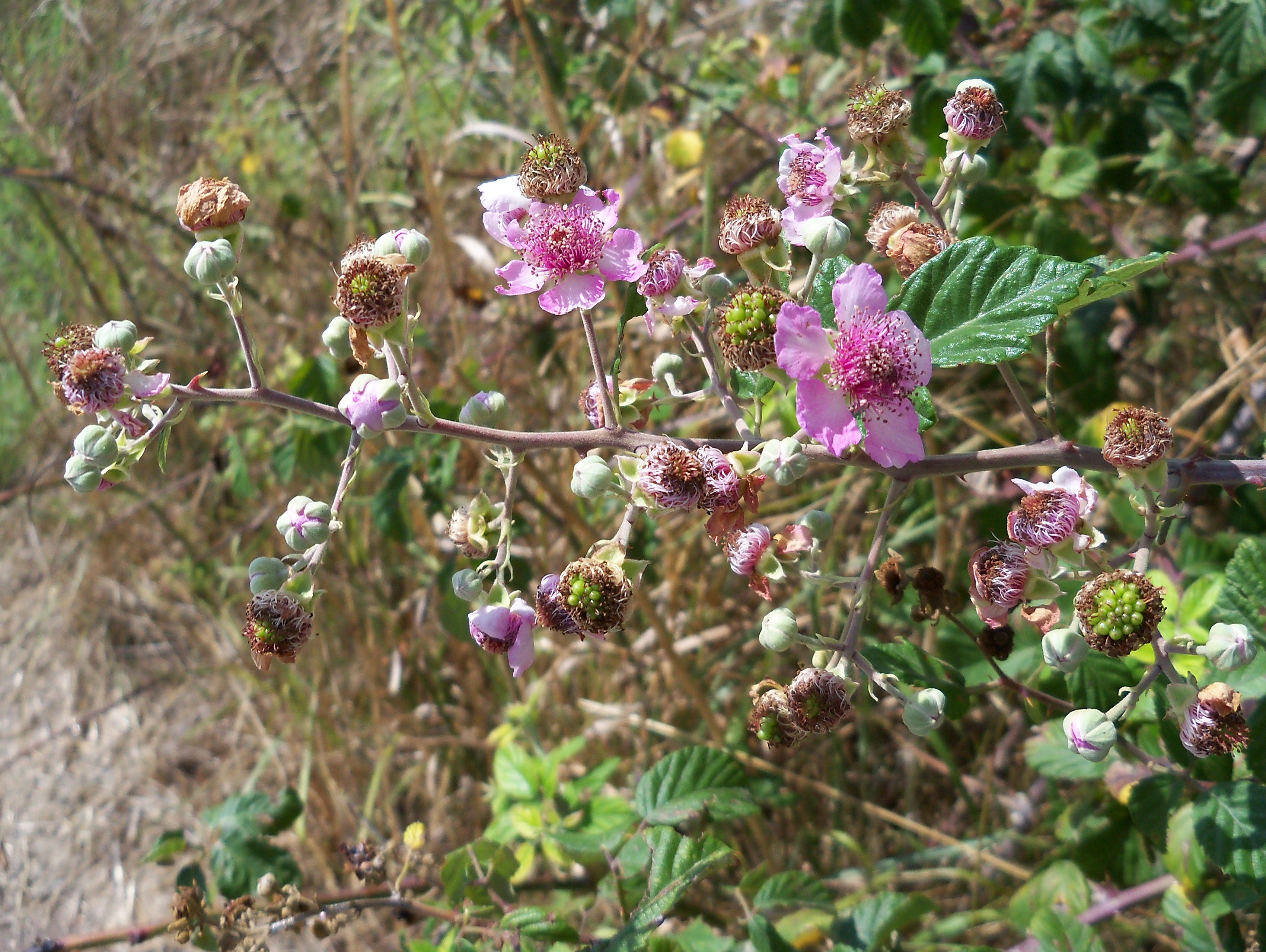 Rubus ulmifolius (Zarzamora) : diversos estadios de floración y fructificación - Avenida de la Libertad, Albatera (Alicante, España).